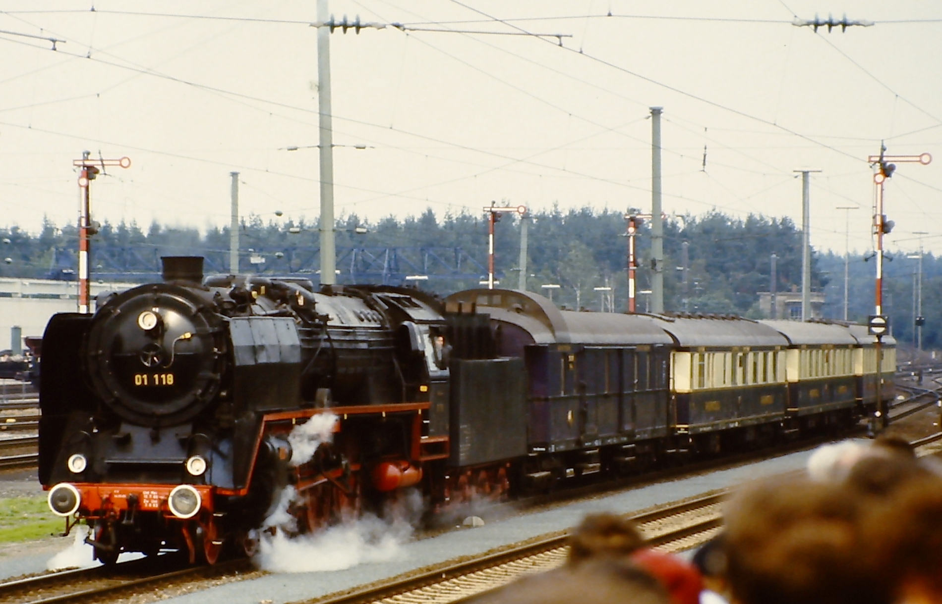 01 118 mit Rheingold in der Jubiläumsparade 150 Jahre deutsche Eisenbahn in Nürnberg